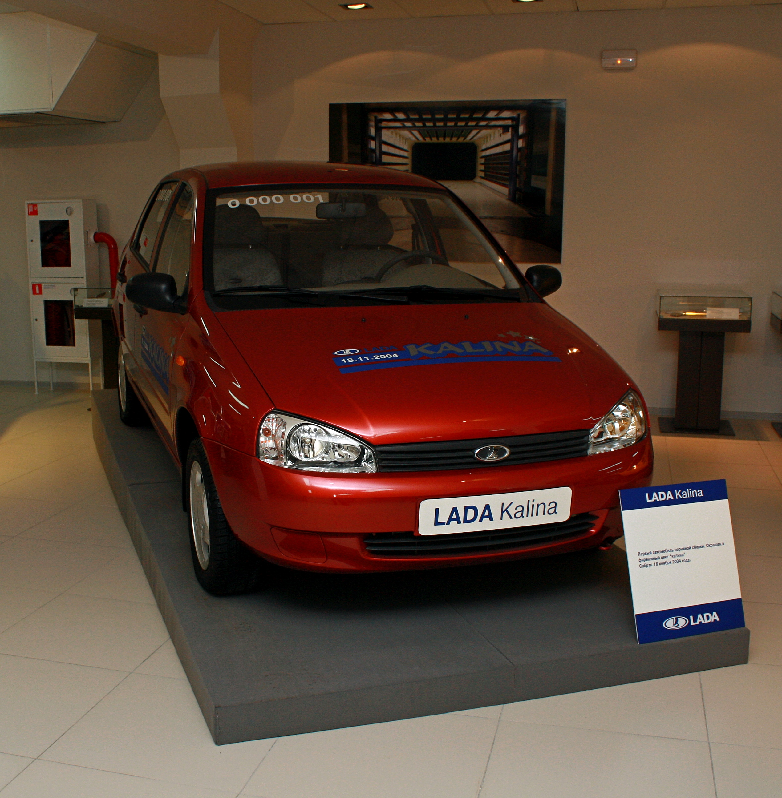 Первая серийная Lada Kalina. Собрана 18 ноября 2004 г.